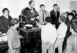 Eliseu no canto esquerdo da imagem.